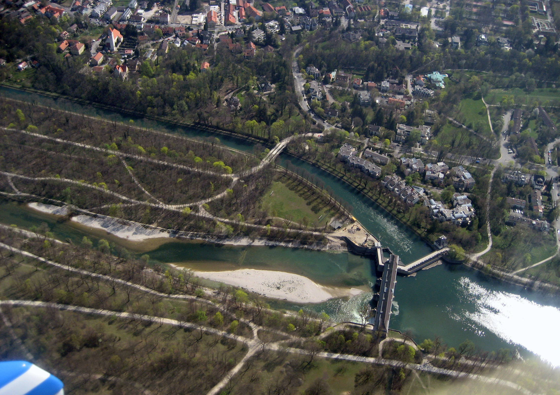 Luftbild der Isar in München am Stauwehr im Herzogpark.